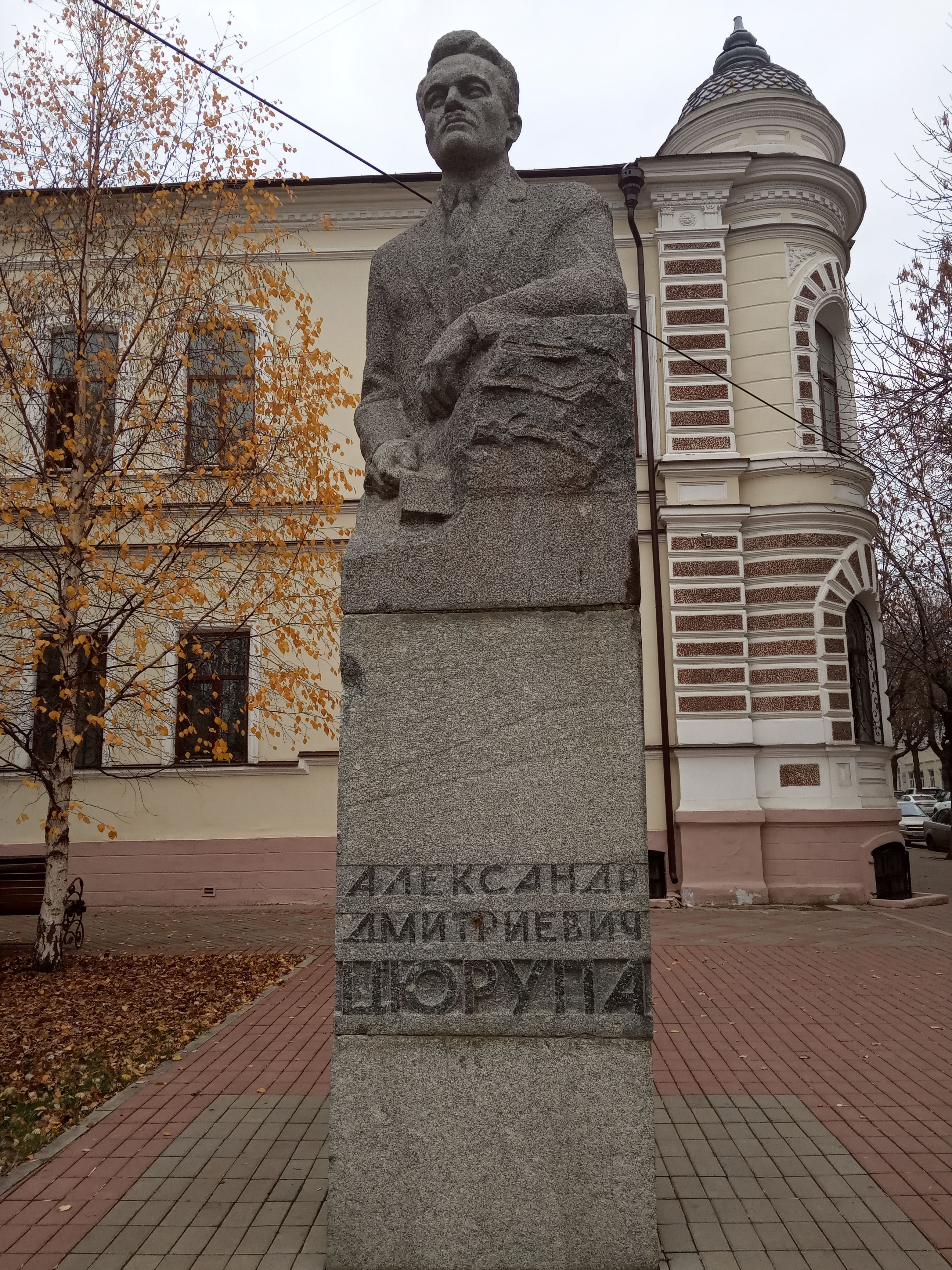 Республика Башкортостан,город Уфа